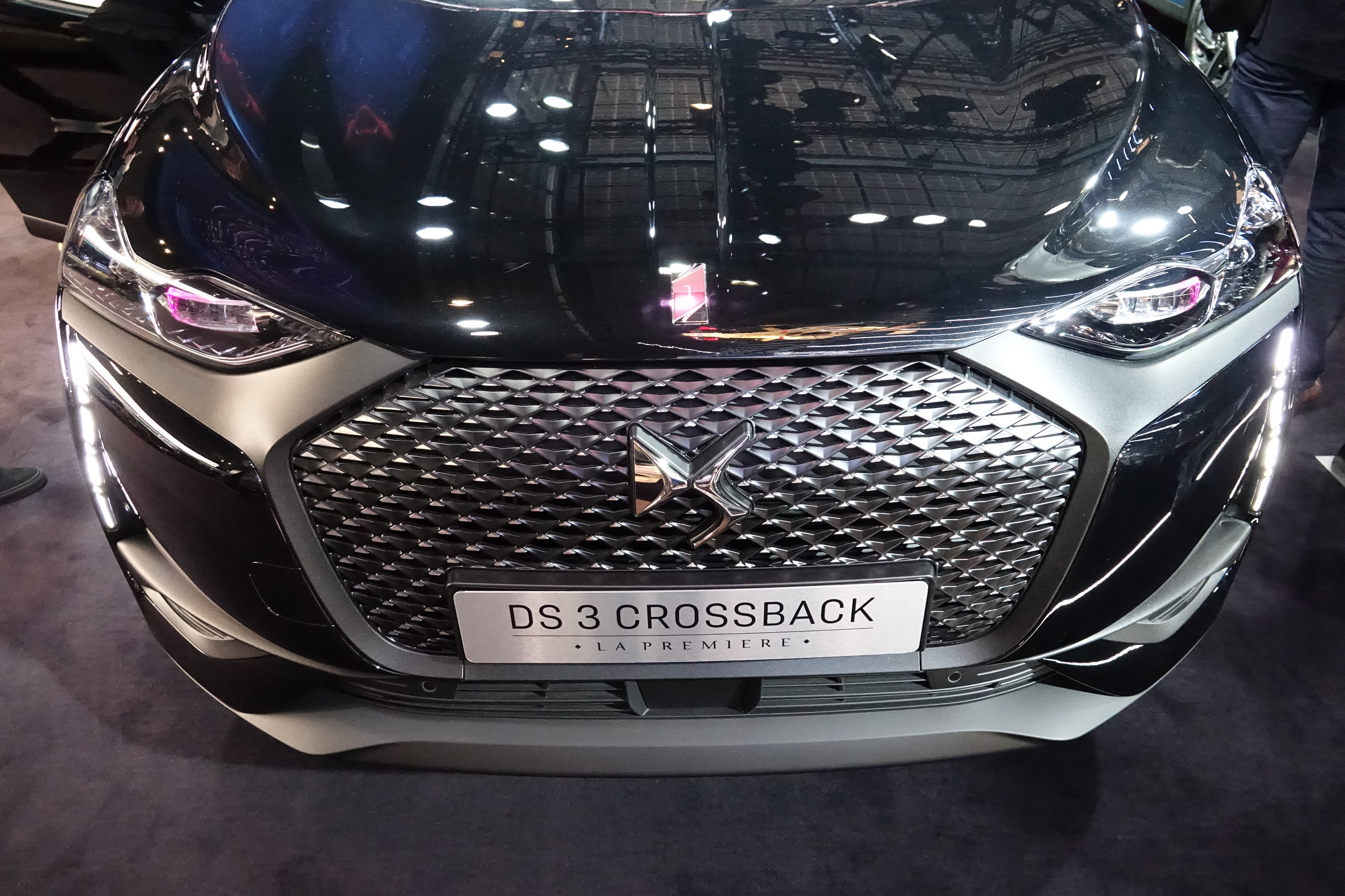 DS 3 Crossback - Mondial de l'Auto 2018